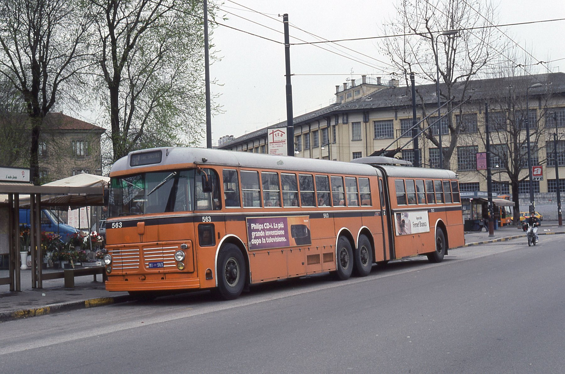 Vettura filoviaria 563 dell'ATM di Milano in sosta in piazzale Lotto